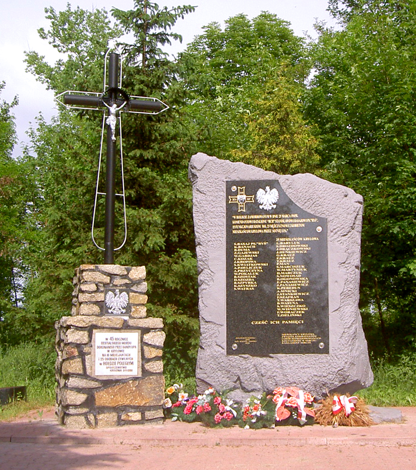 Kryłów, Poland • Pomnik / Monument